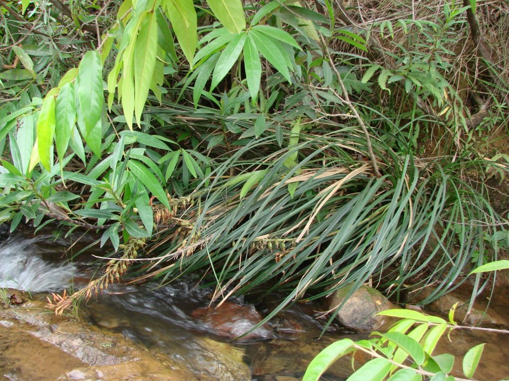 Pitcairnia ulei L.B. Sm. - BROMELIACEAE - Poço Azul - Brazlândia - Distrito Federal - Brasil.